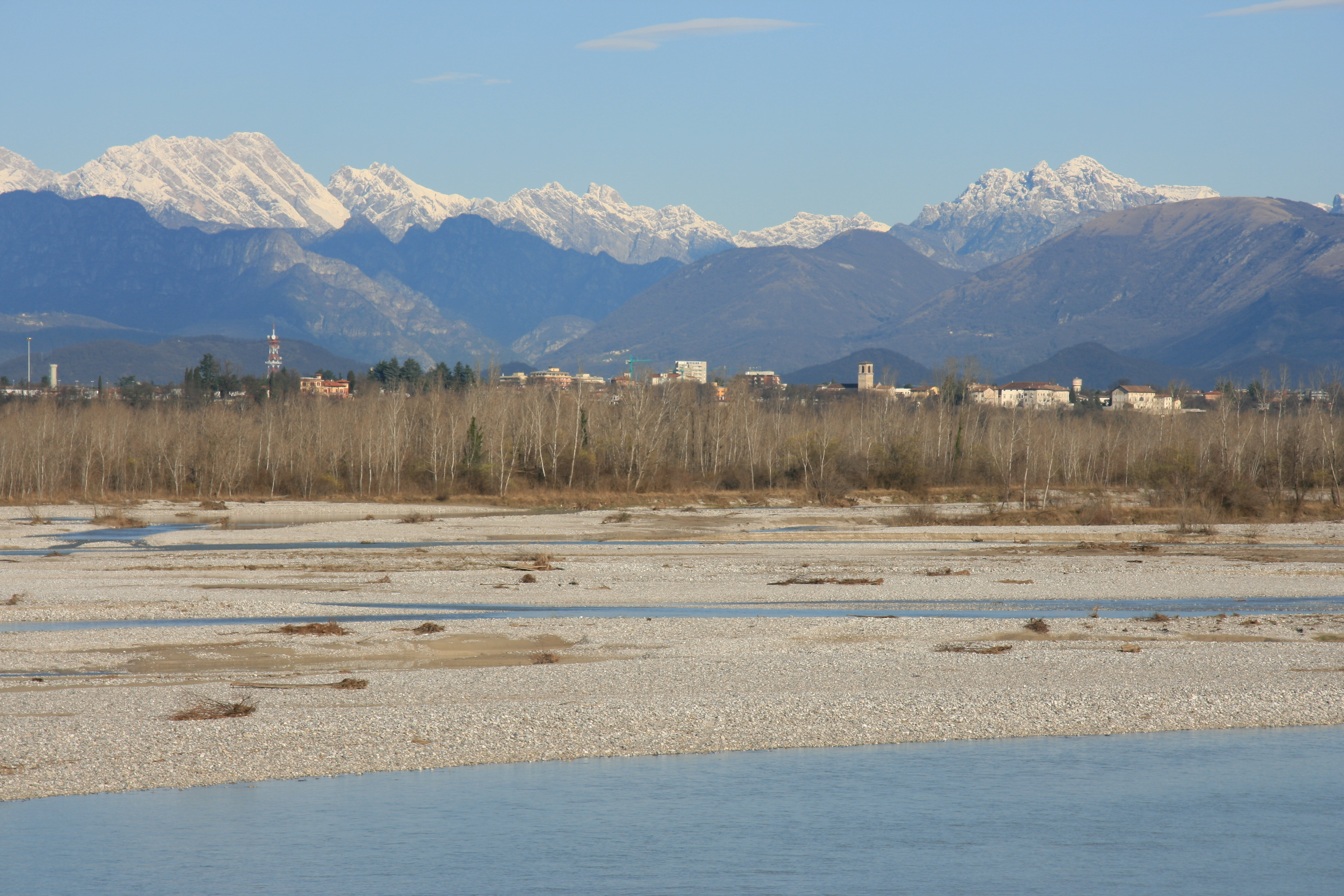 Vista del fiume tagliamento e Spilimbergo (sullo sfondo), dal ponte di Dignano